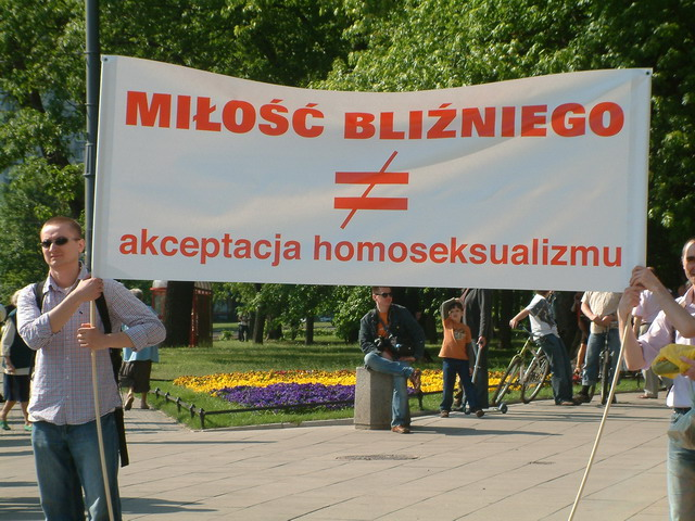 „MIŁOŚĆ BLIŹNIEGO ≠ akceptacja homoseksualizmu“, Poland, Warsaw, Parada Równości